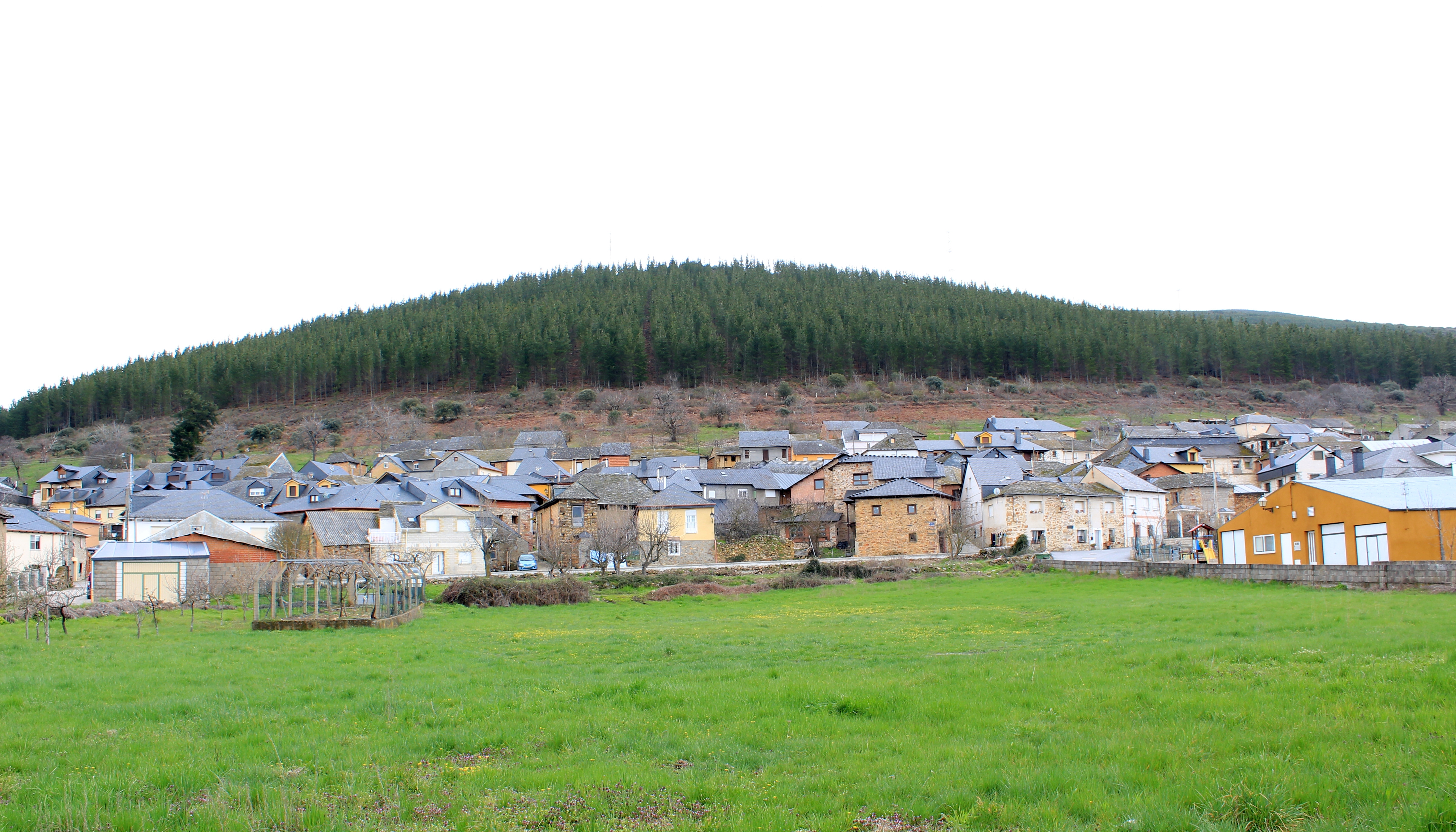 Vista panorámica de Castropodame, provincia de León, comarca de El Bierzo.